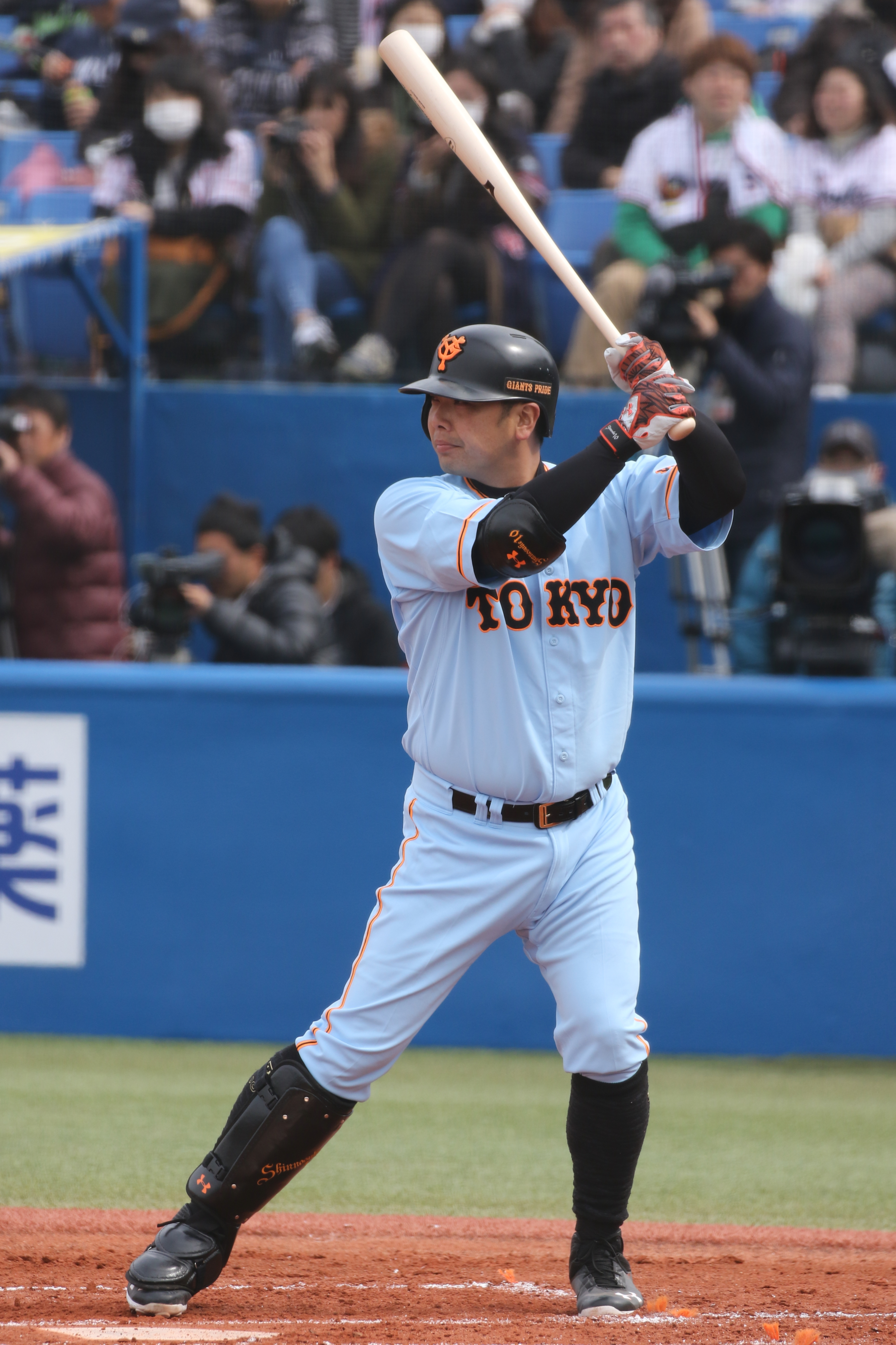 ジャイアンツ阿部選手